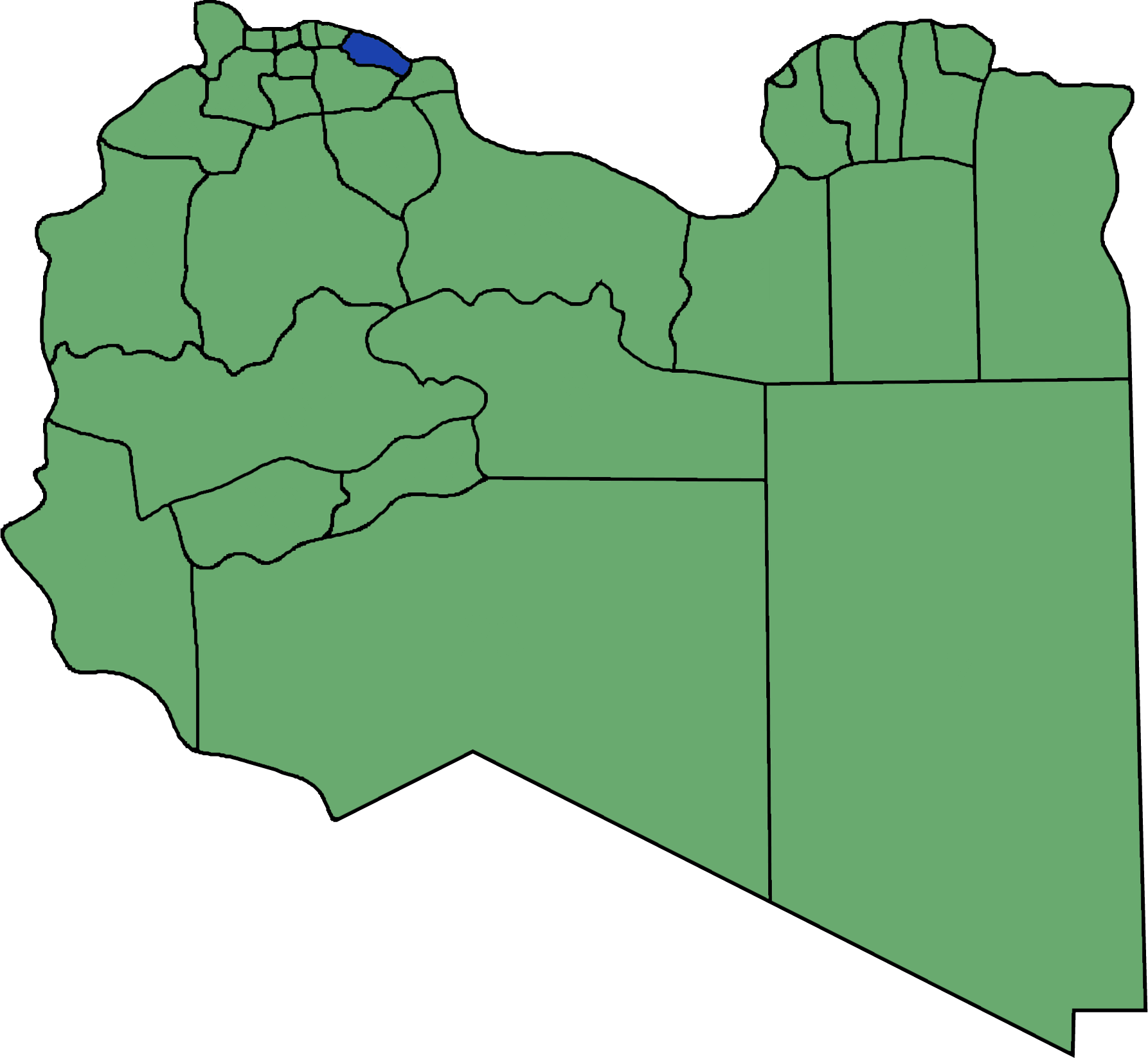 Die neuen Gemeinden (Munizipien) in Libyen. Al Murgub hervorgehoben.